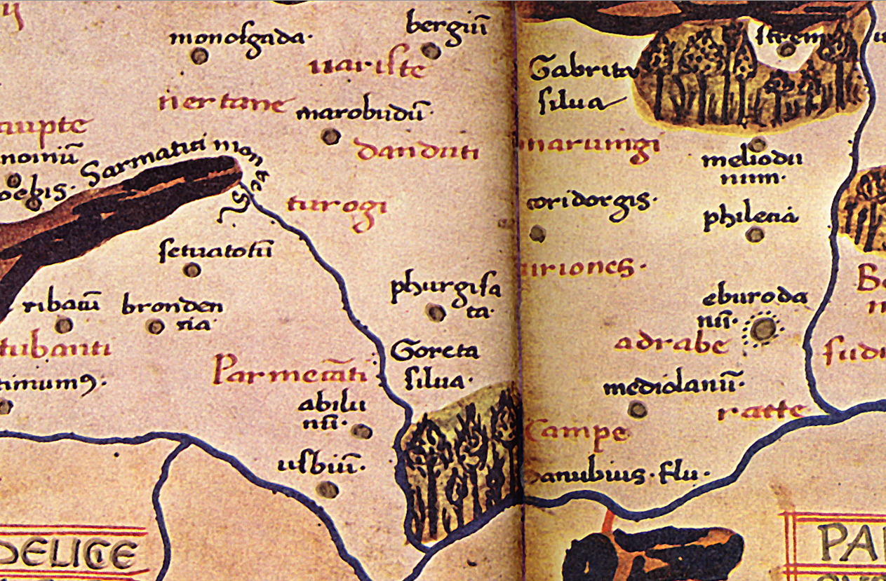 Die Ortsbezeichnung "MERSOUION" (hier: ""), Detailbild von der Karte zur Germania magna.